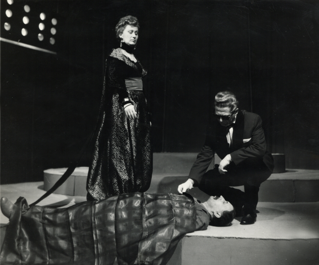 Friedrich Dürrenmatt, Obisk stare gospe, SNG v Mariboru. Na fotografiji: Angelca Jenčič Janko (Claire Zahanassian, rojena Wäscher), Boris Brunčko (Sluga), Franjo Blaž (Ill).